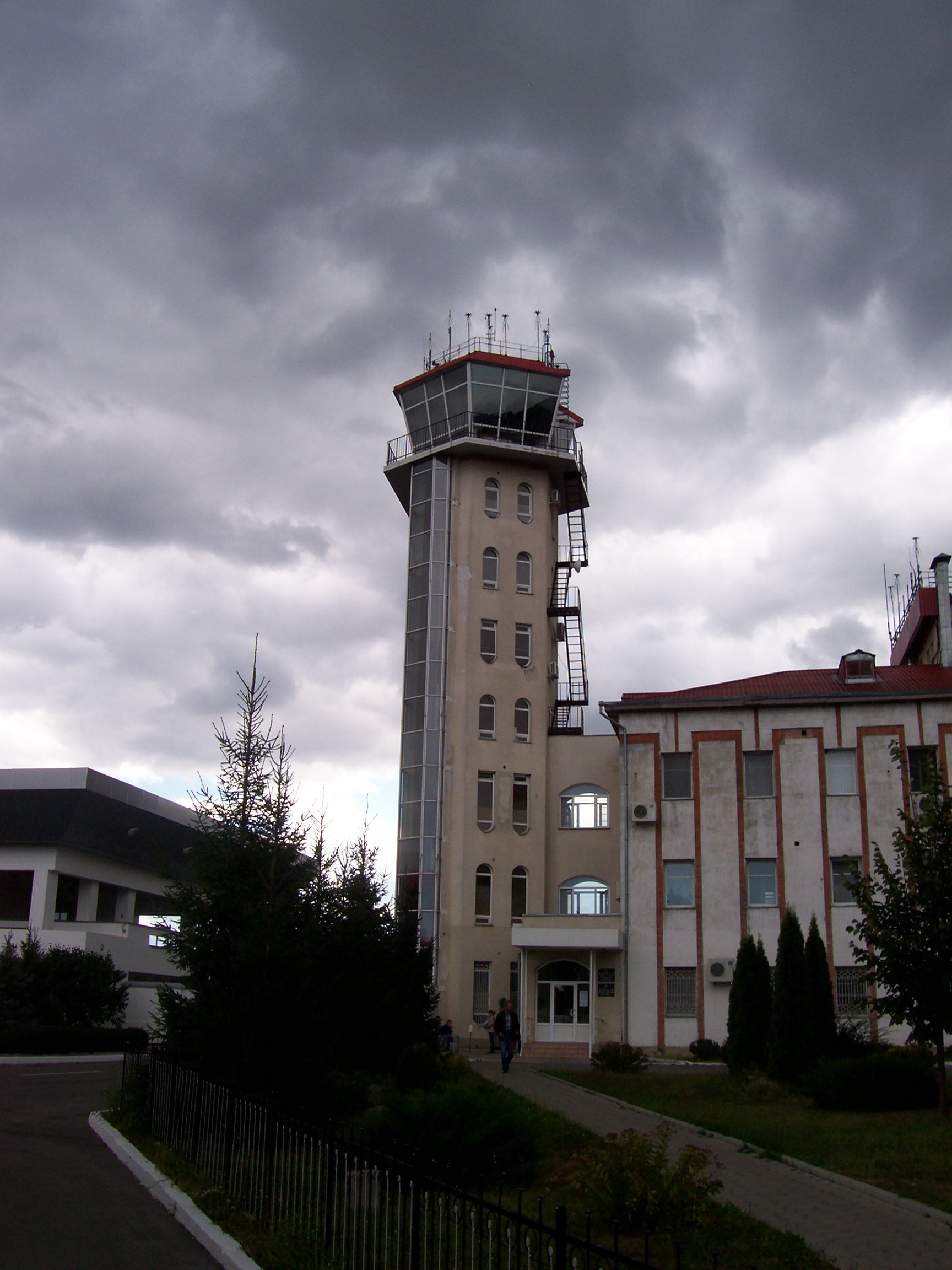 Tour de contrôle de l'aéroport de Chişinău (Moldavie)